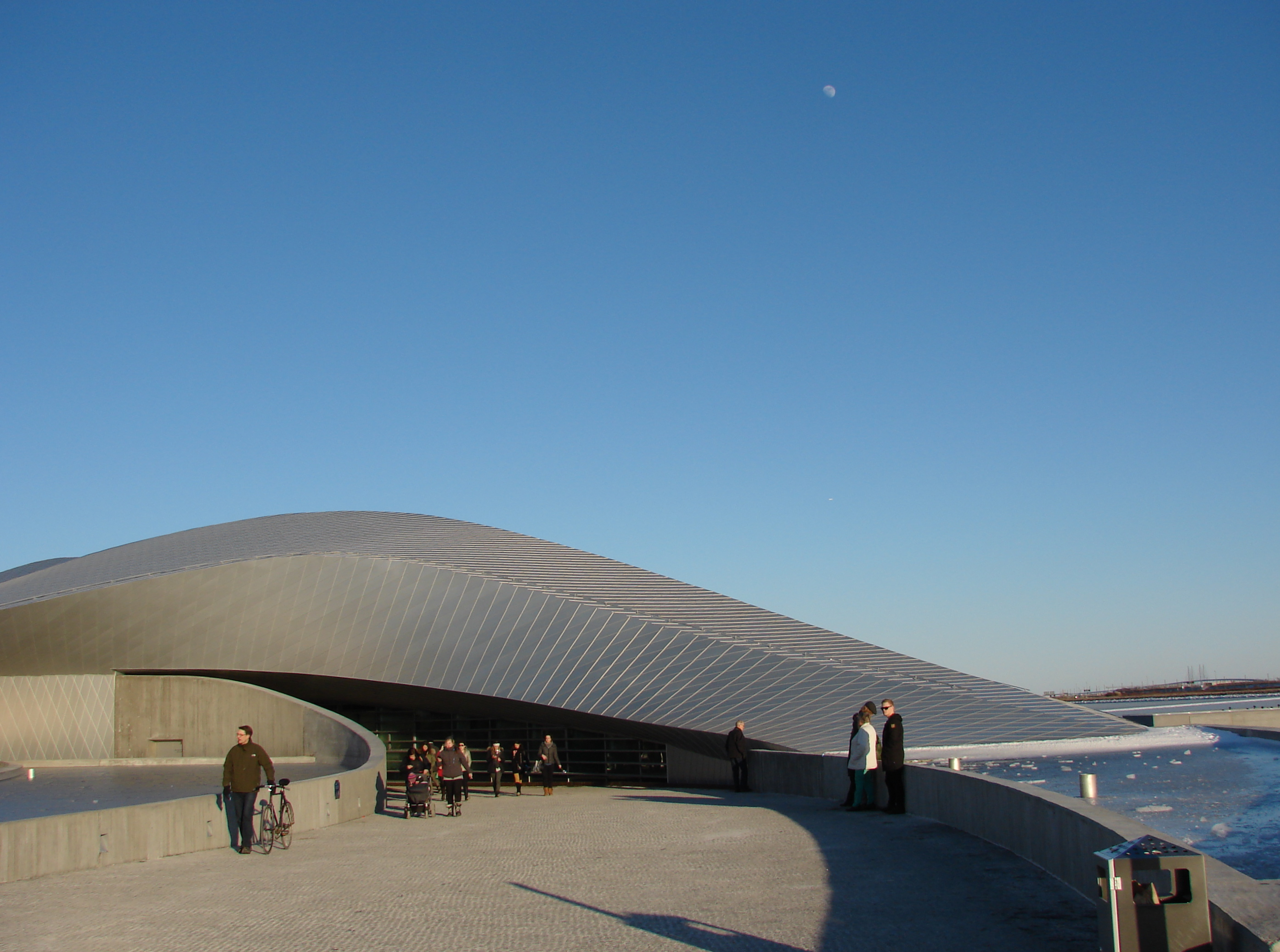 Den Blå Planet, Danmarks Akvarium, tegnet af 3XN, Jacob Fortlings Vej, Kastrup, Amager